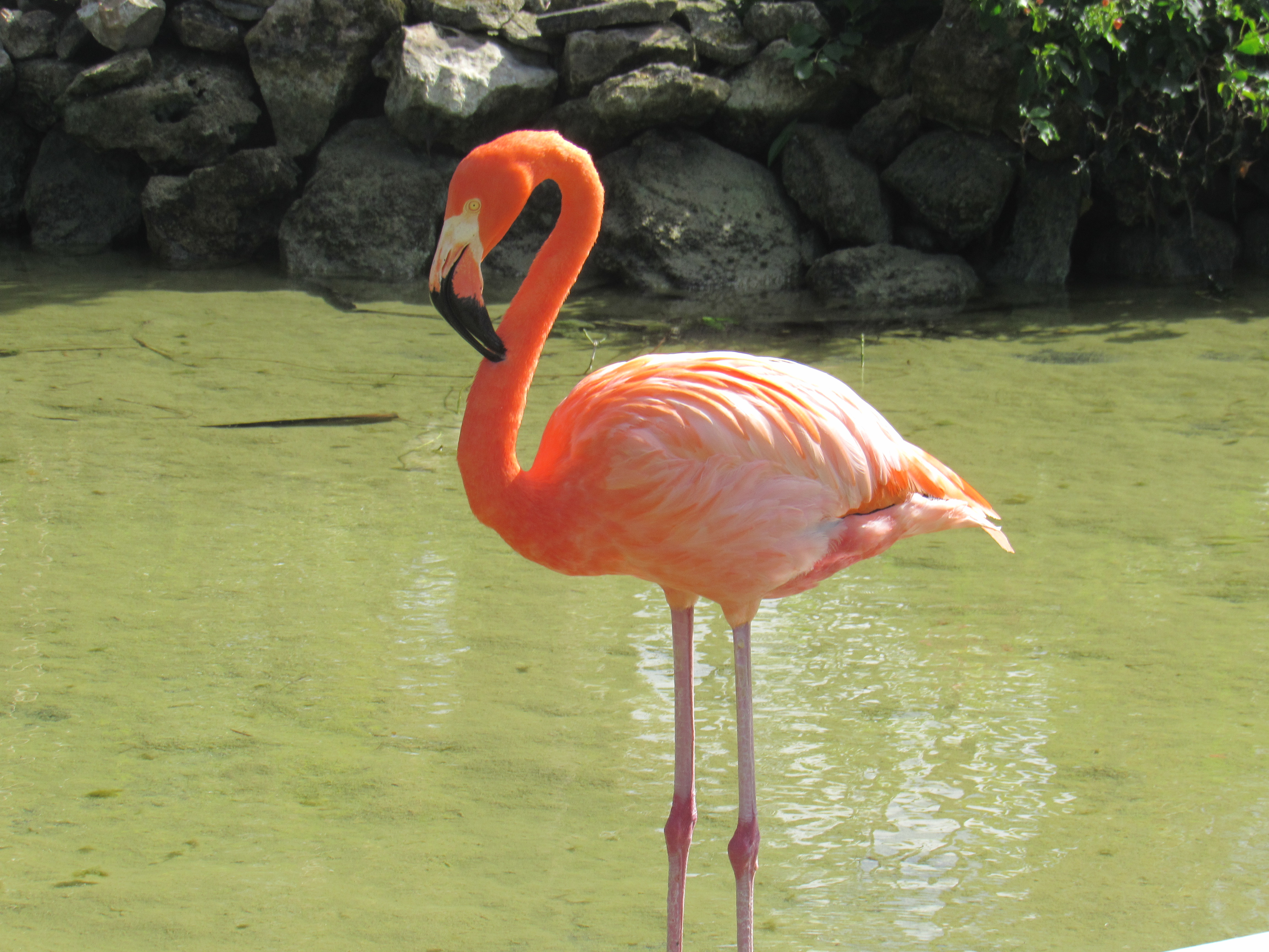 Phoenicopterus ruber (Flamenco del Caribe) Fotografiado en una Laguna al interior del hotel Melia Caribe Tropical, Playa Bávaro, Punta Cana, República Dominicana.